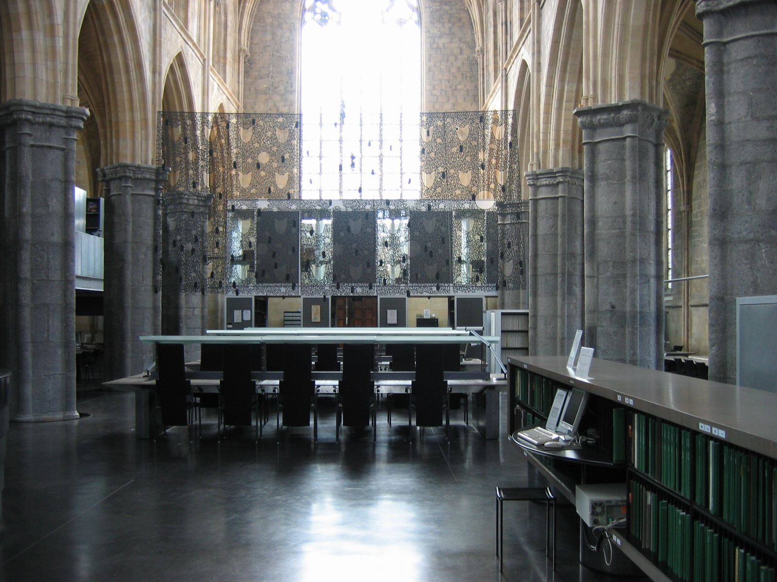 Maastricht, Rijksarchief Limburg Voormalige FRANCISCANENKERK EN -KLOOSTER, tegenwoordig Rijksarchief. Gotische kerk met basilicaal schip, 1298? en een eenbeukig koor, XV. In de moderne archiefgebouwen zijn gedeelten opgenomen van de vroegere kruisgang. Verder is er nog een oud gedeelte vrijstaand ten zuidoosten van de kerk.